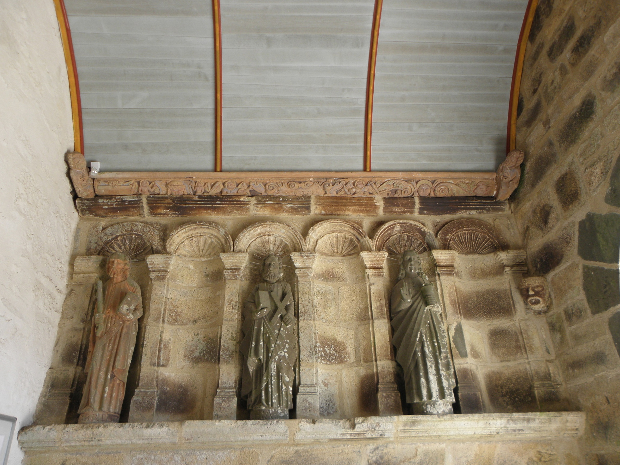 Église Sainte-Pitère du Tréhou (29). Saint-Pierre, Saint-André et Saint-Jean. Apôtre de la costale intérieure est du porche sud.